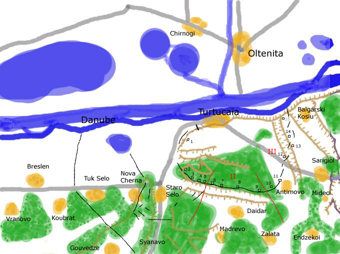 Carte de l'_attaque_de_la_place_forte_de Turtucaïa en 1916.